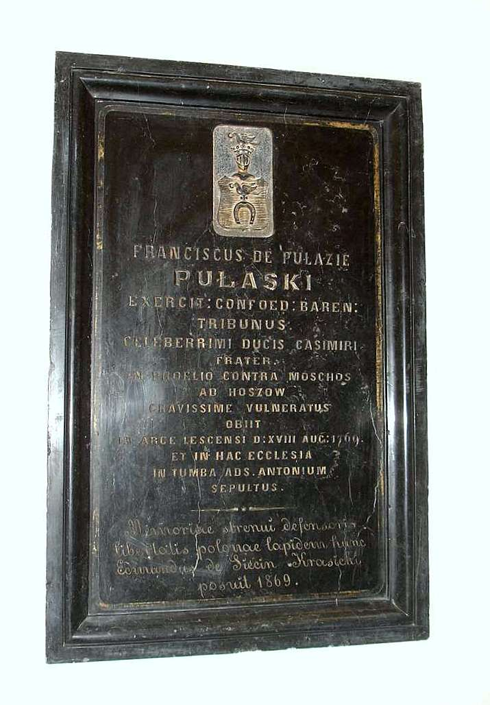 pro memoria